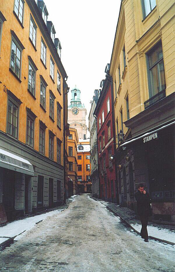 Storkyrkan seen from Gråmunkegränd.